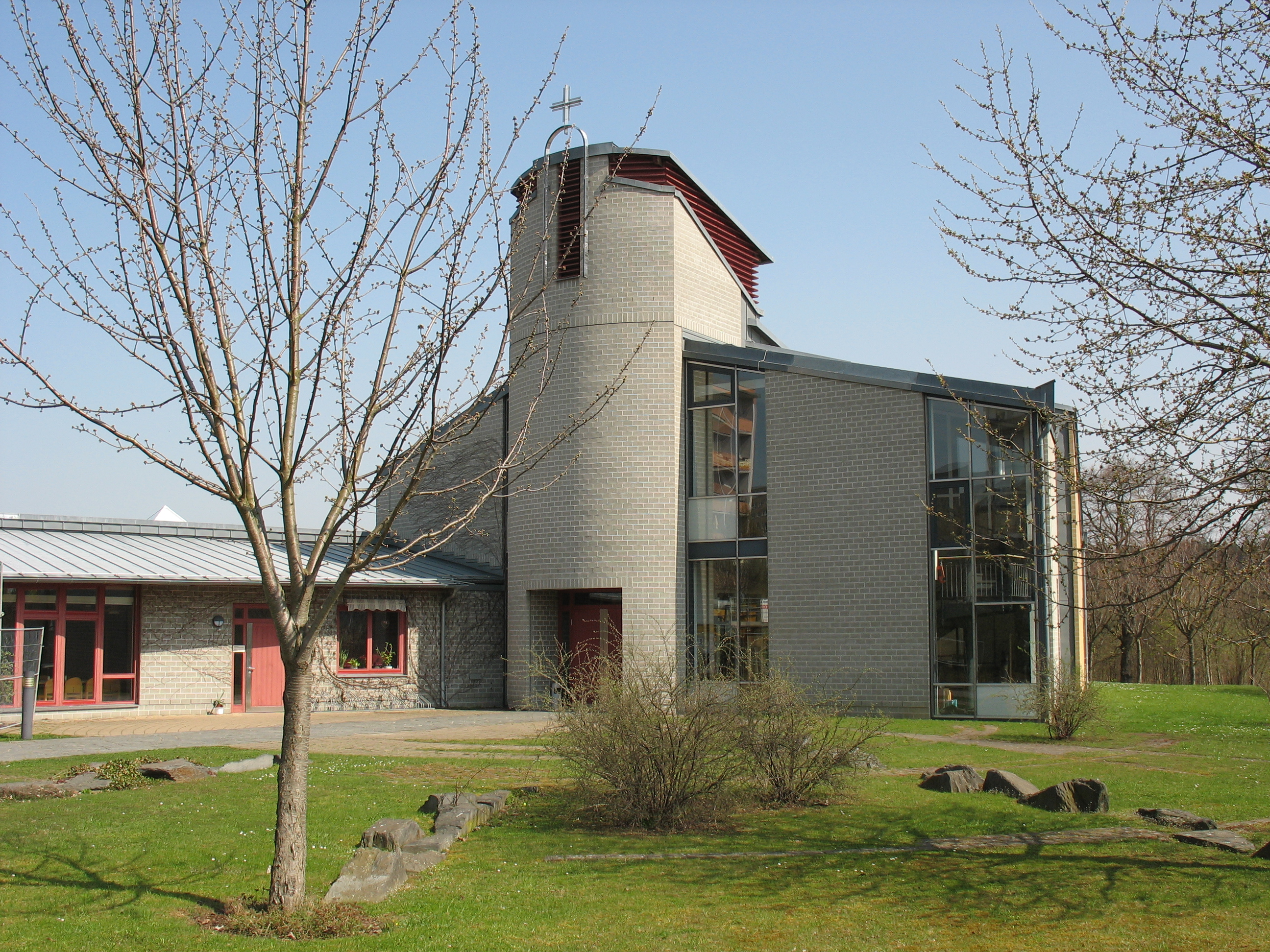 Plauen, die evangelische Versöhnungskirche vom Friesenweg aus gesehen.